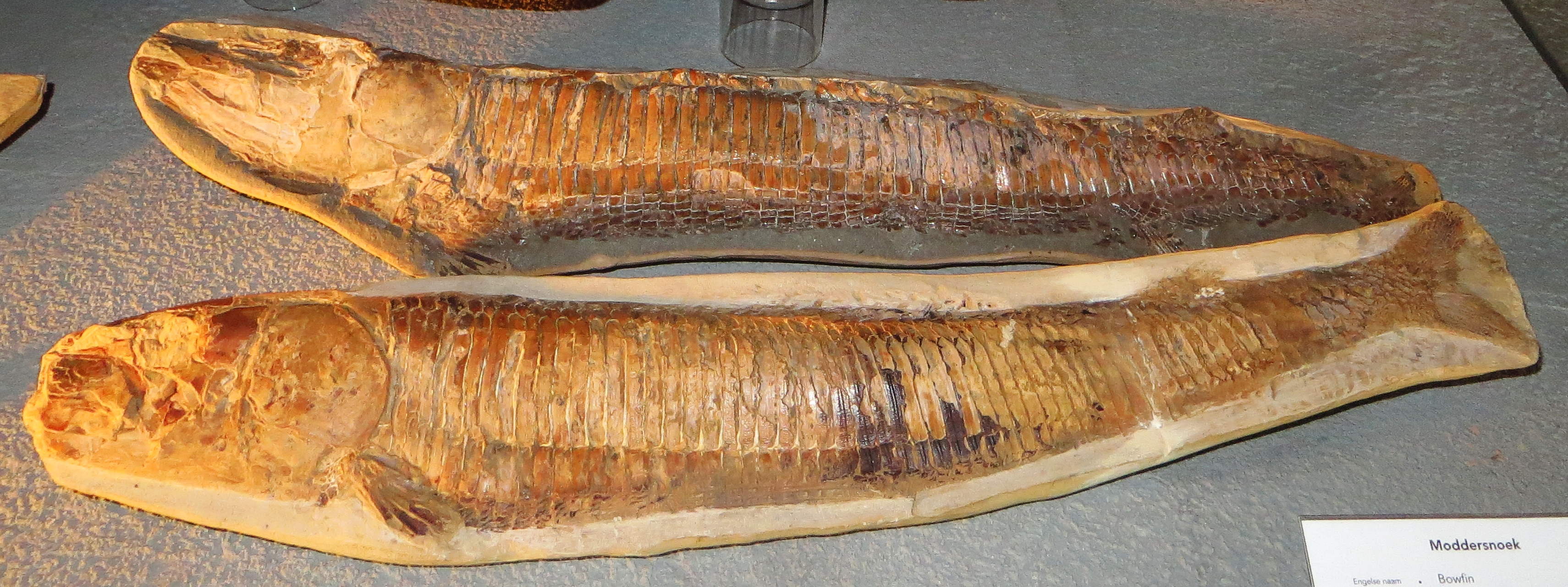 Fossil of Vinctifer, an extinct fish - Took the picture at Naturalis, Leiden